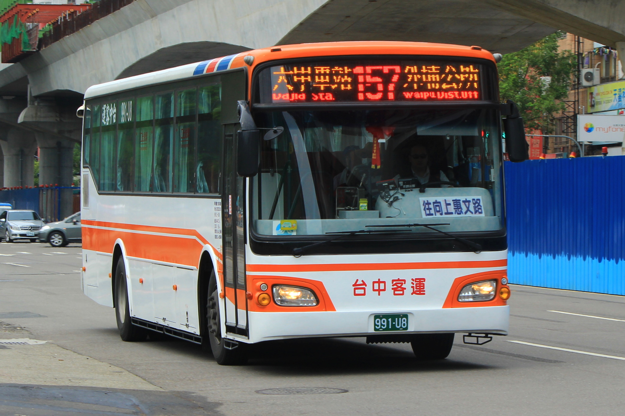 中文（台灣）: 157 文心森林公園